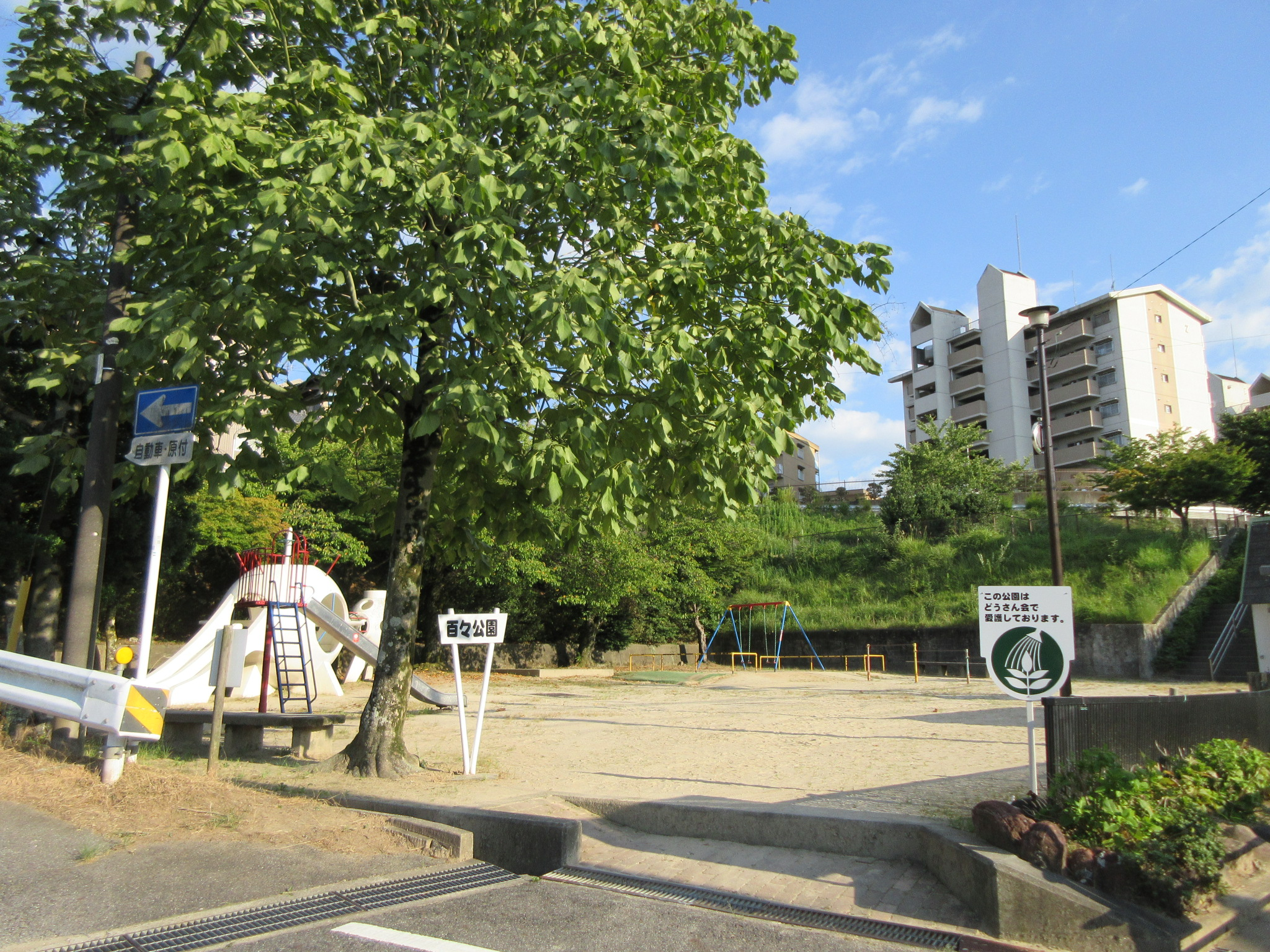 百々公園（岡崎市百々町）